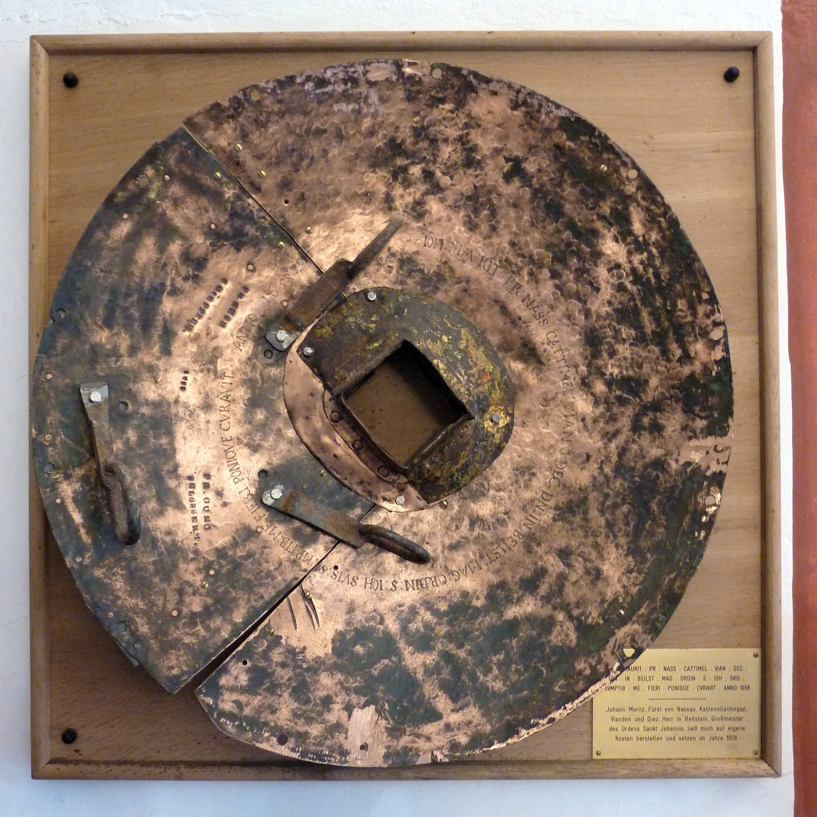 Stadt Siegen in Nordrhein-Westfalen, Bundesrepublik Deutschland: Evangelische Nikolaikirche, Originalfuß des 1658 von Fürst Johann Moritz von Siegen-Nassau gestifteten „Krönchens“, ausgestellt im Portalbereich